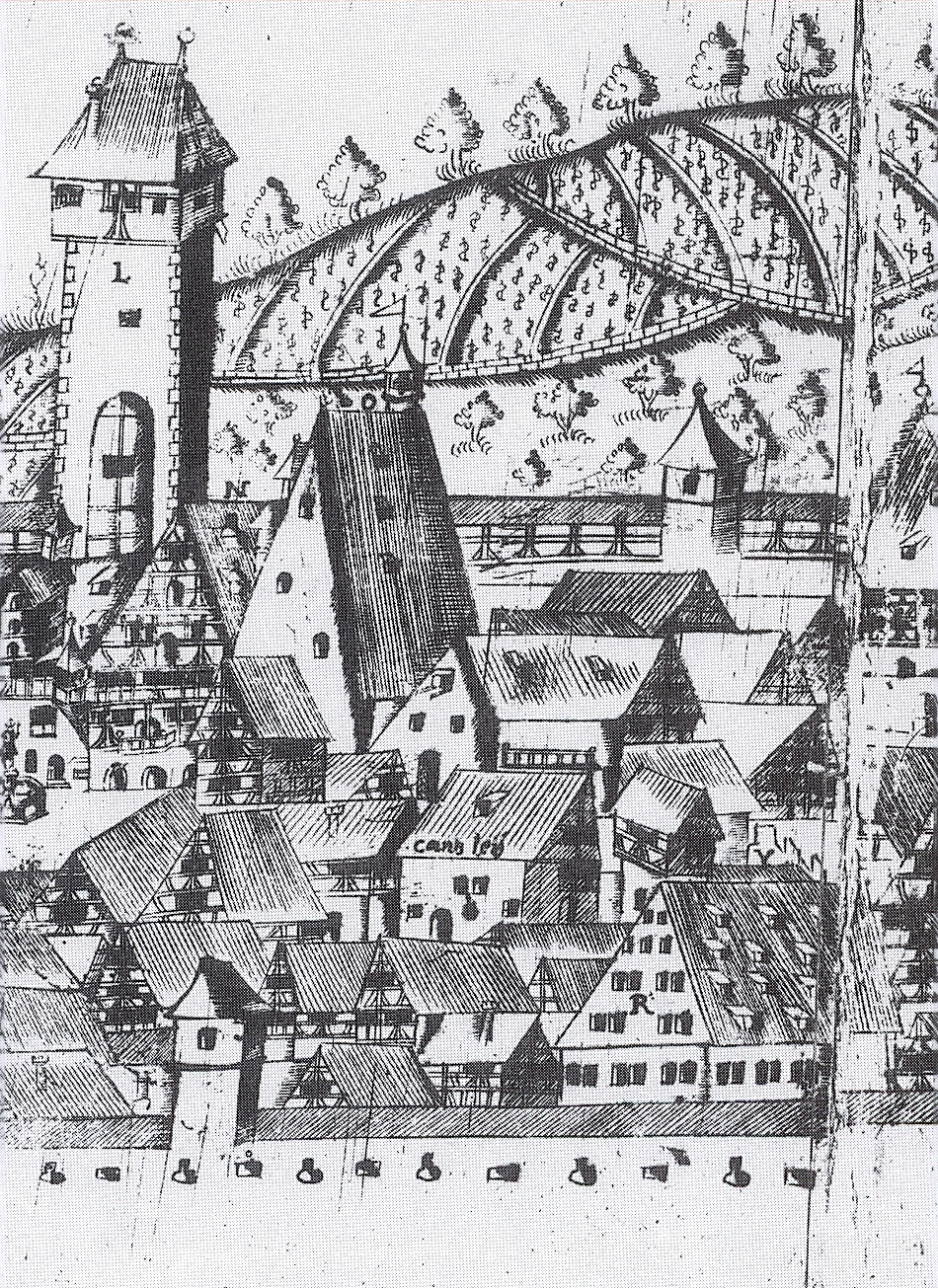 Viertel der Kaufleute und Bänker, Marktplatz mit den wenigen frühmittelalterlichen Steinhäusern: Rathaus, rechts davon "Bürgerhaus" (mit steilem Giebel und Glockentürmchen auf dem Dachfirst), "Kanzleigebäude", "Königsbronner Klosterhof" mit zinnenartigem Giebel und turmähnlichen Gebäude.